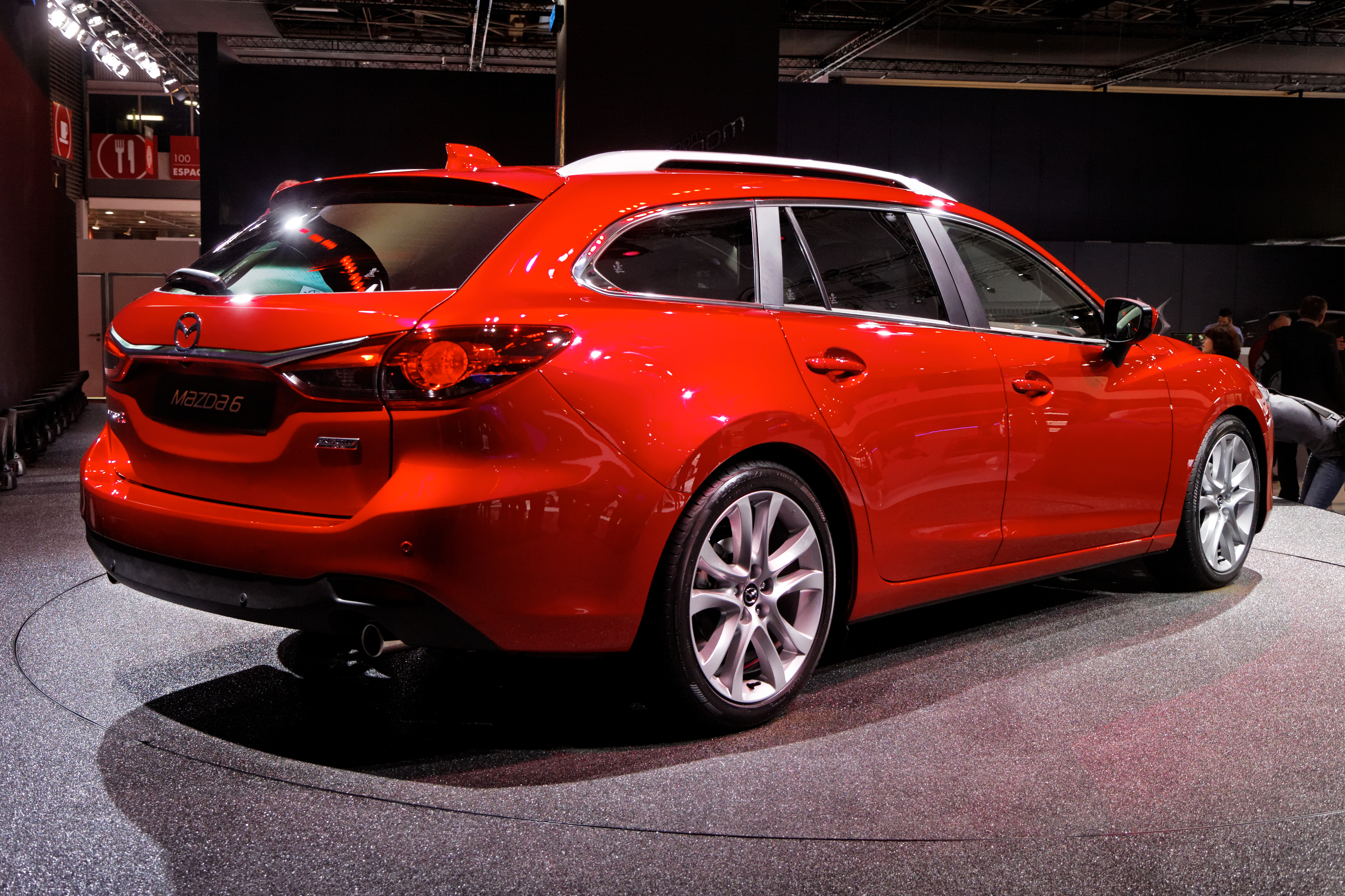 La Mazda 6 présentée lors du Mondial de l'automobile 2012 à Paris.